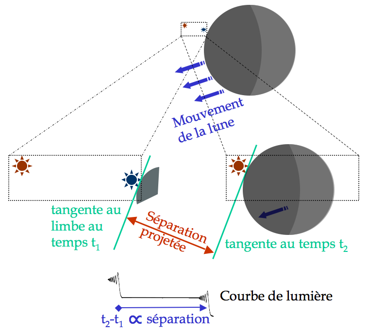 principe de la mesure d'occultation d'une étoile double par la lune